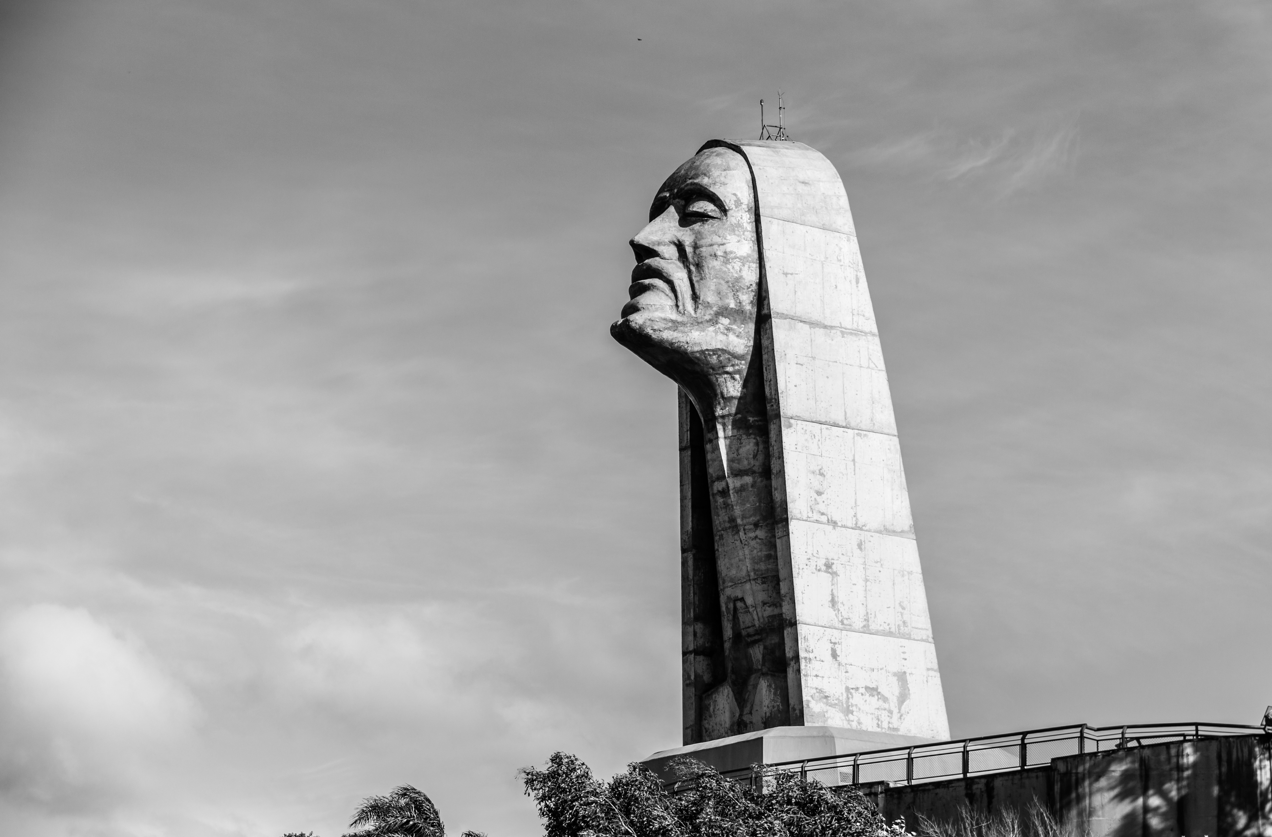 Estátua de Jesus Cristo erguida dentro dos Pavilhões da Festa Nacional da Uva. A estátua abraça a cidade de 500 mil habitantes e transmite bons sentimentos e proteção.